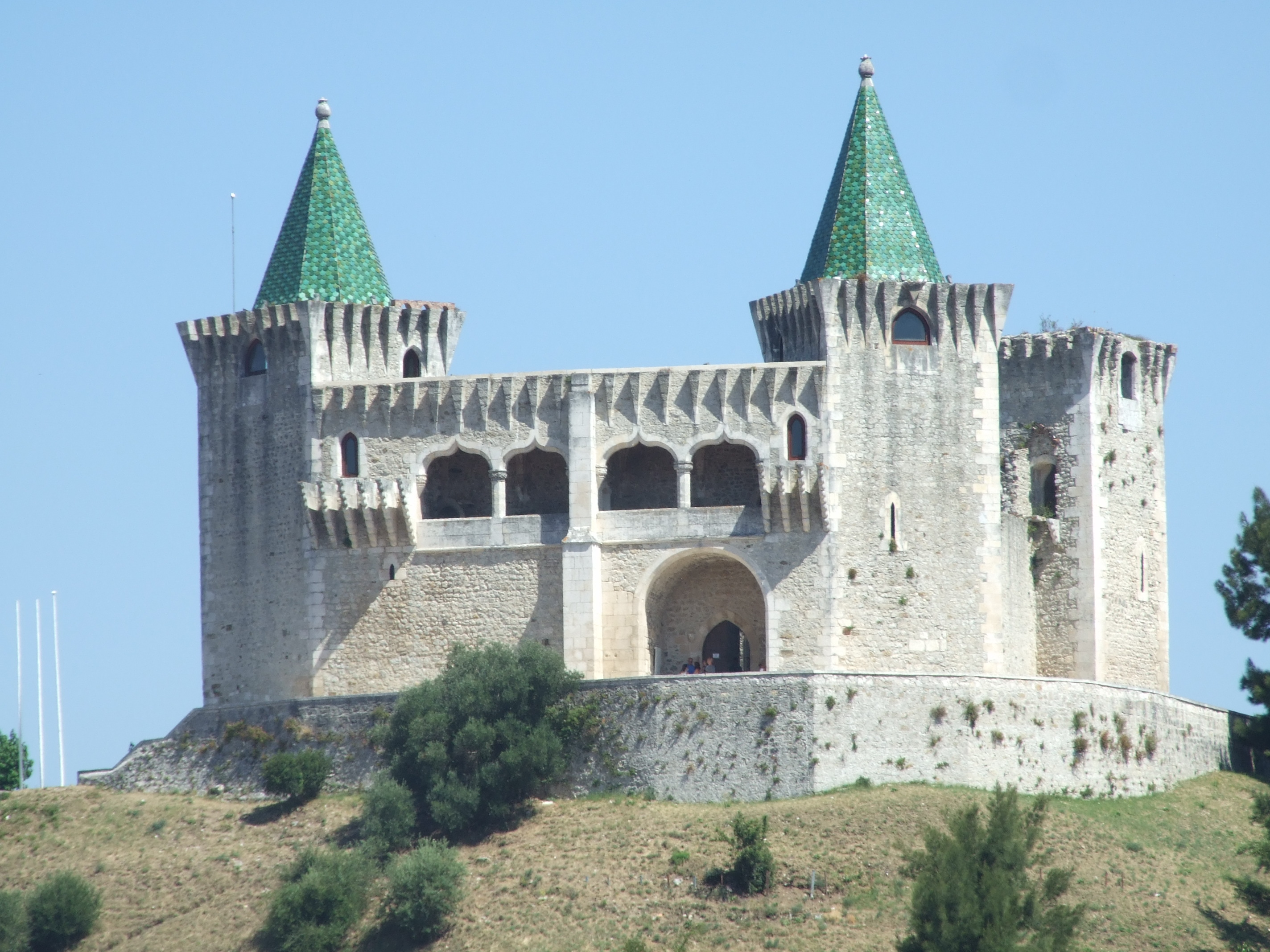 Castelo de Porto de Mós, a partir dos Moinhos de São Miguel.